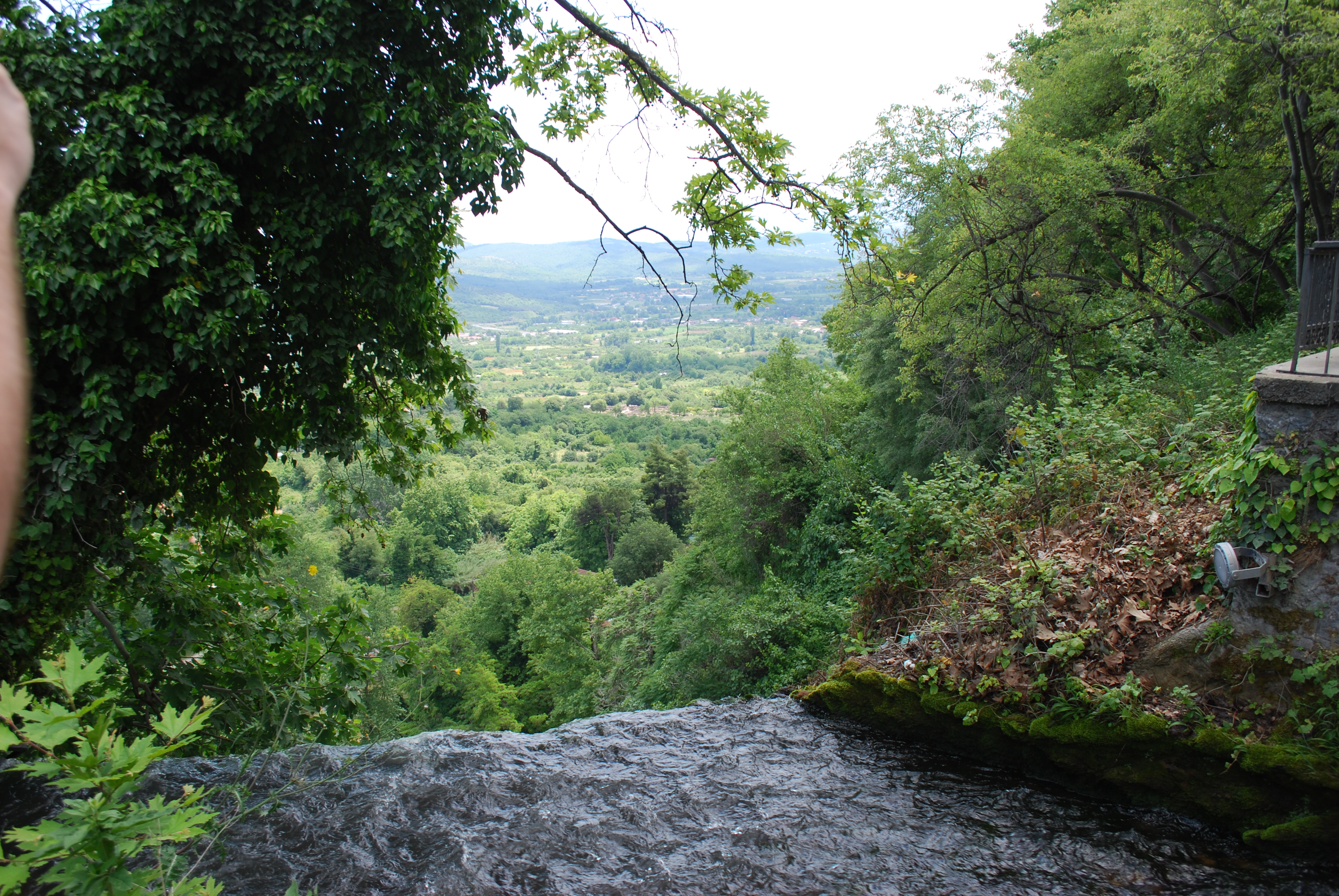 Vue des cataractes d'Edessa, en Macédoine (Grèce).